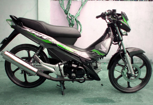 Honda_XRM_125_RS